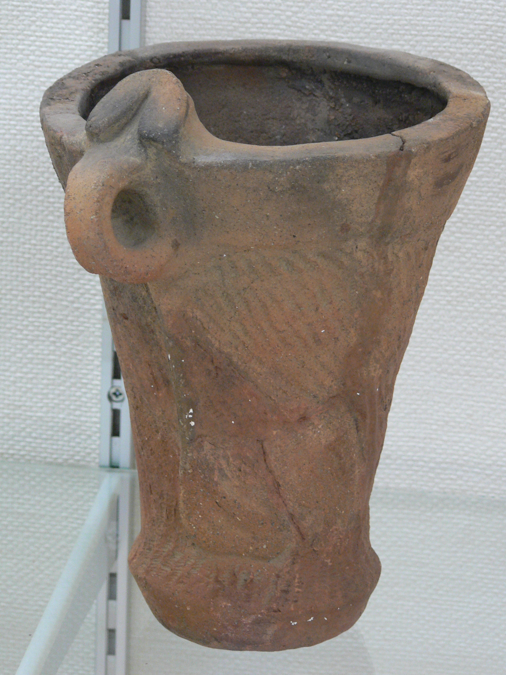 長野県井戸尻遺跡4号址出土の縄文土器（井戸尻式）井戸尻考古館収蔵。